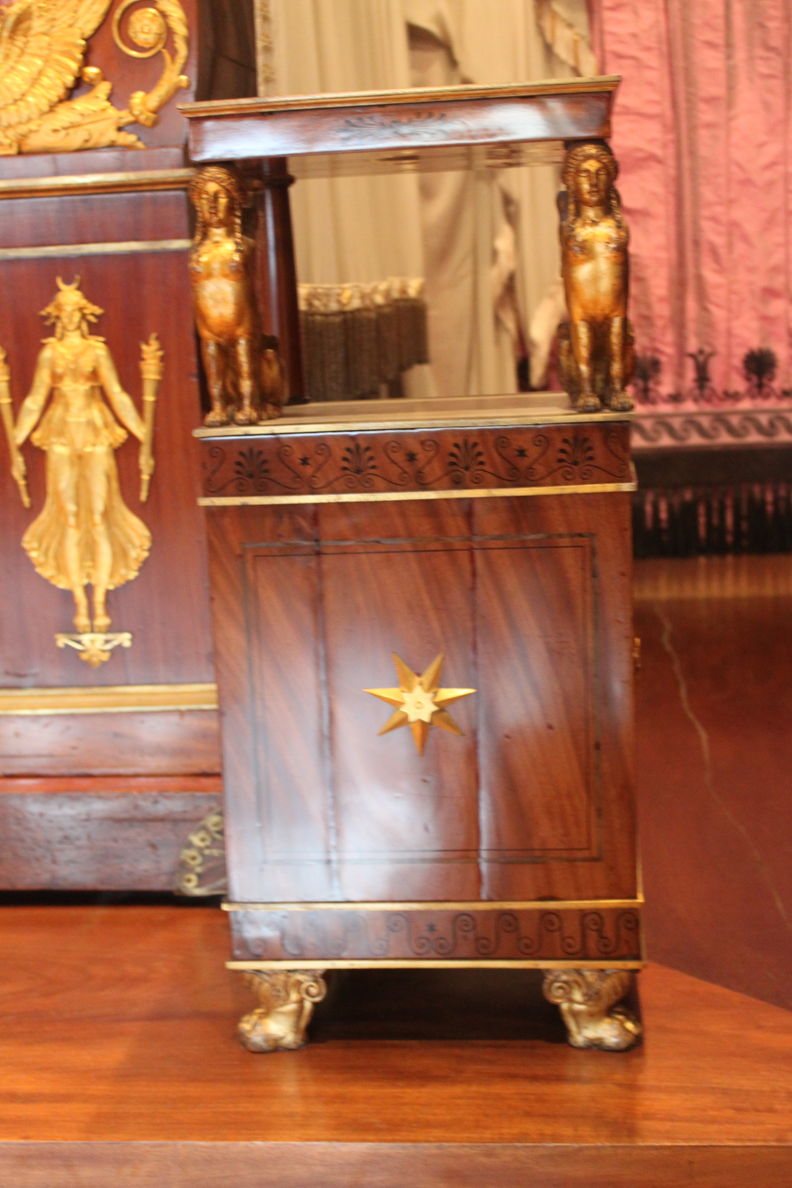 Table de nuit, Attribué à Jacob frères, d'après Louis Berthault - vers 1799 - Louvre - Acajou, ébène, cuivre, bronze doré, marbre - OA 11743